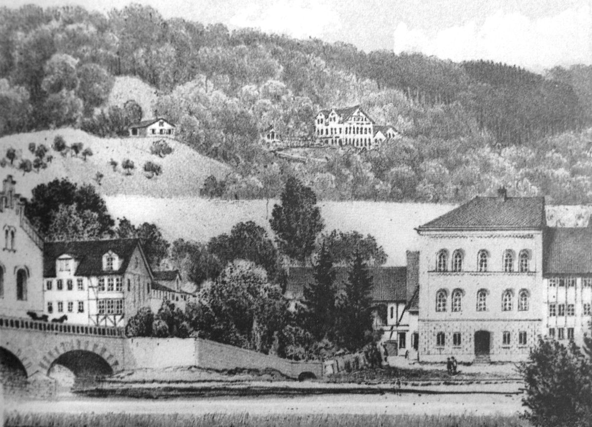 Andrees Berggarten von der Werra gesehen, undatiert, ca. 1880